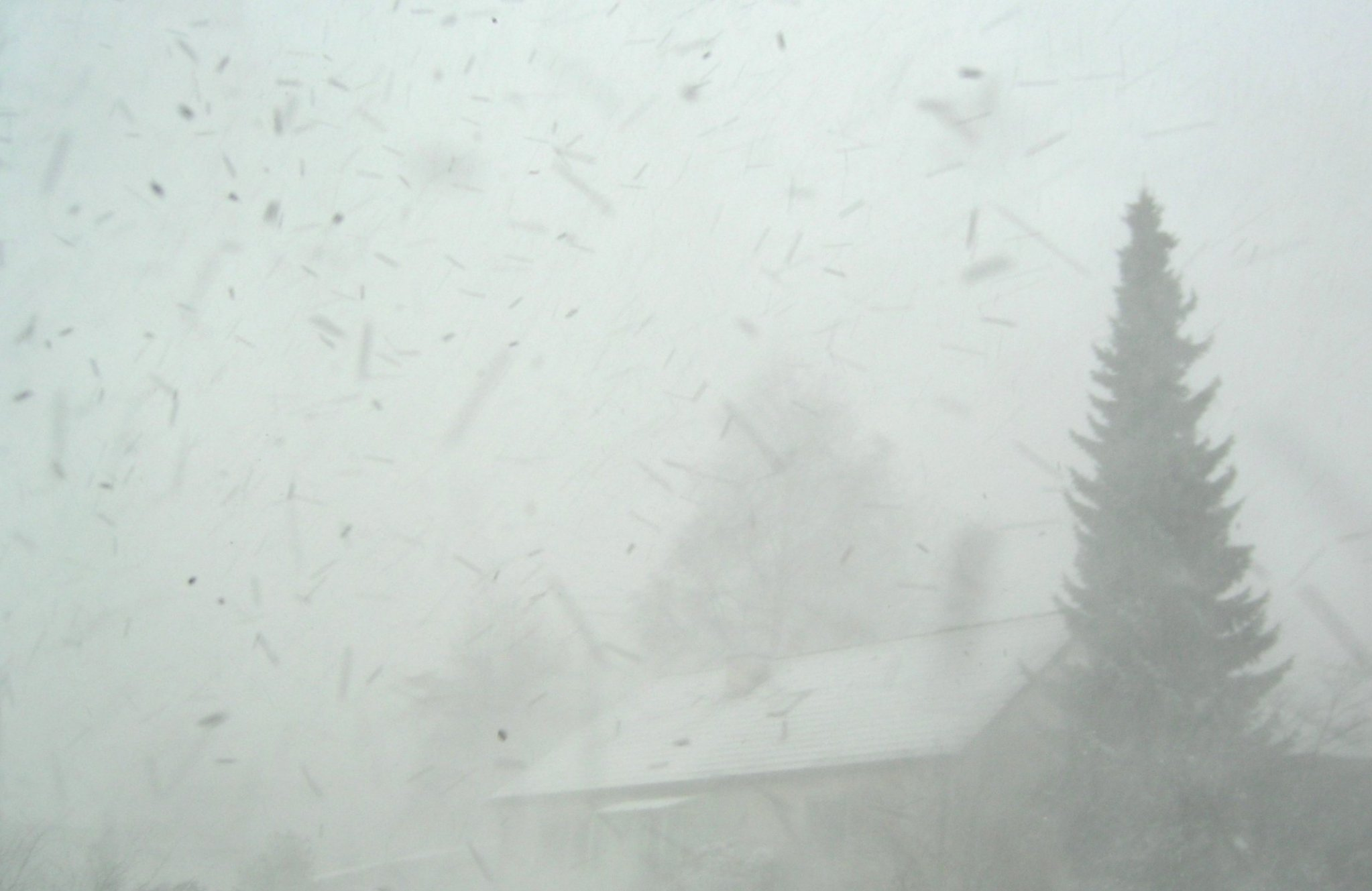 (en) Nearly a blizzard … (de) Ein halber Schneesturm, es war aber relativ warm Aufnahmeort: Schweiz, SG Bearbeitung: GIMP Helligkeitswert angepasst